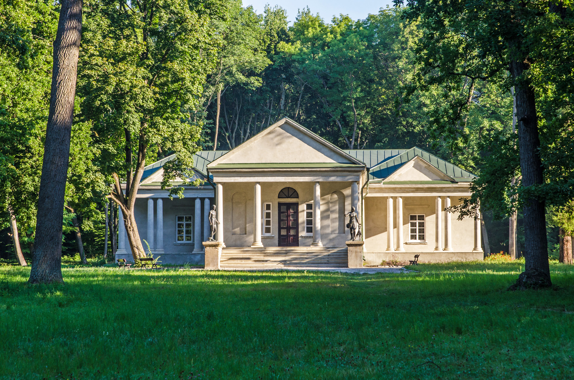 Парк "Олександрія" та паркові споруди, Біла Церква, Сквирське шосе